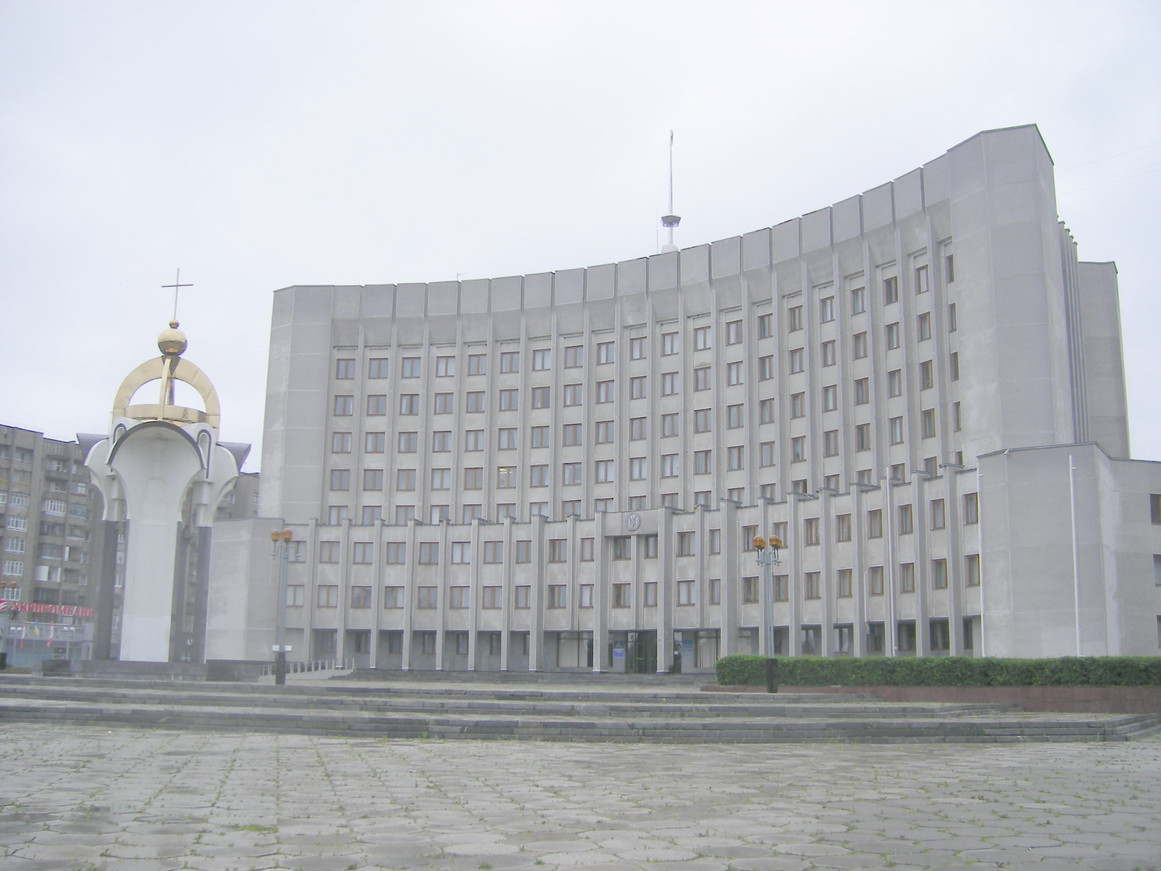 Lutsk, Oblast Administration Building